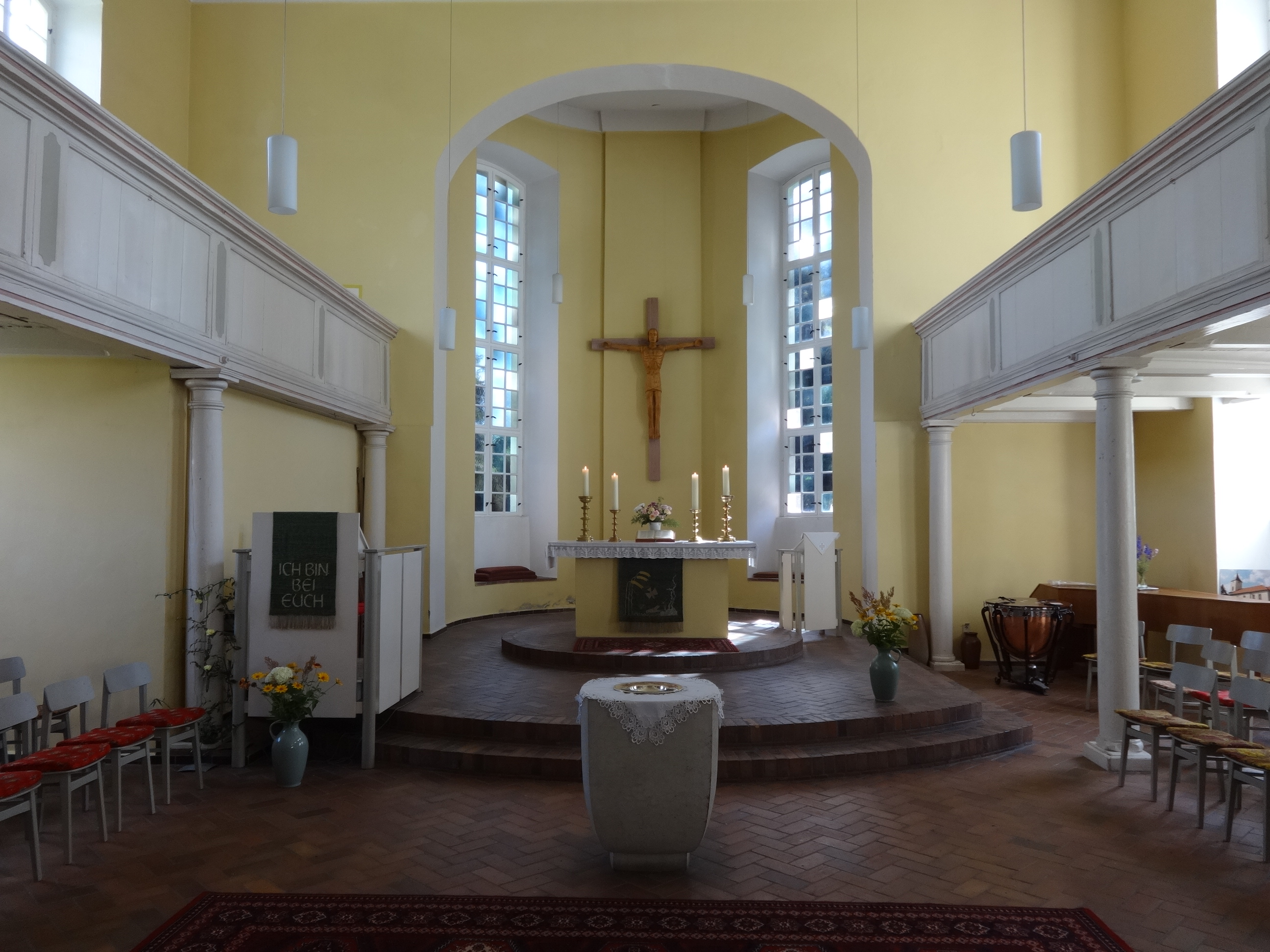 Die Dorfkirche in Sperenberg entstand in den Jahren 1752 und 1753 nach Plänen des Landbaumeisters Georg Friedrich Berger. Im Innern befinden sich zwei Altarleuchter eines Hamburger Reeders aus dem Jahr 1612 sowie ein Holzkreuz des Sperenberger Bildhausers Egon Liebold.